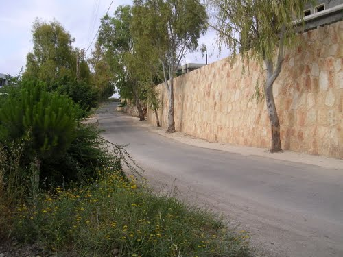 Route dans le village de Jennata, Liban.